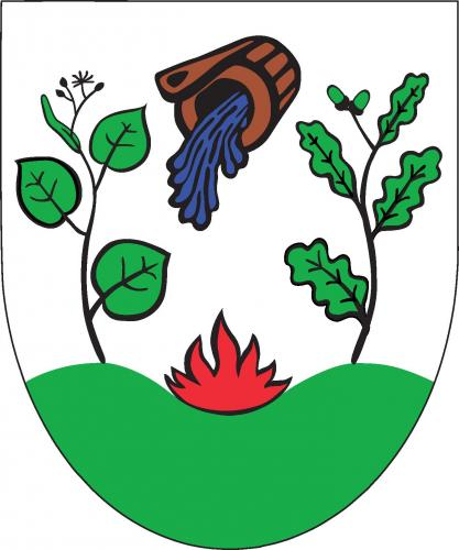 znak, Krasíkov, okres Ústí nad Orlicí